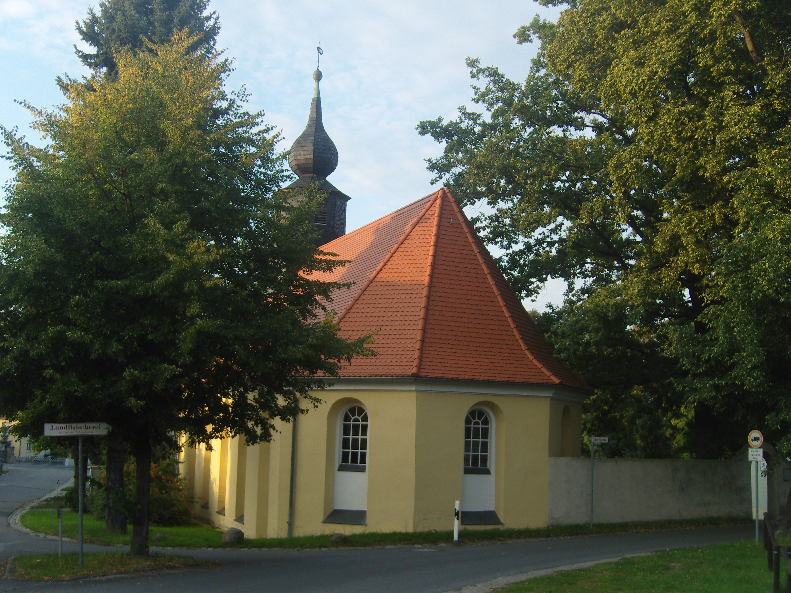 Dorfkirche Linz